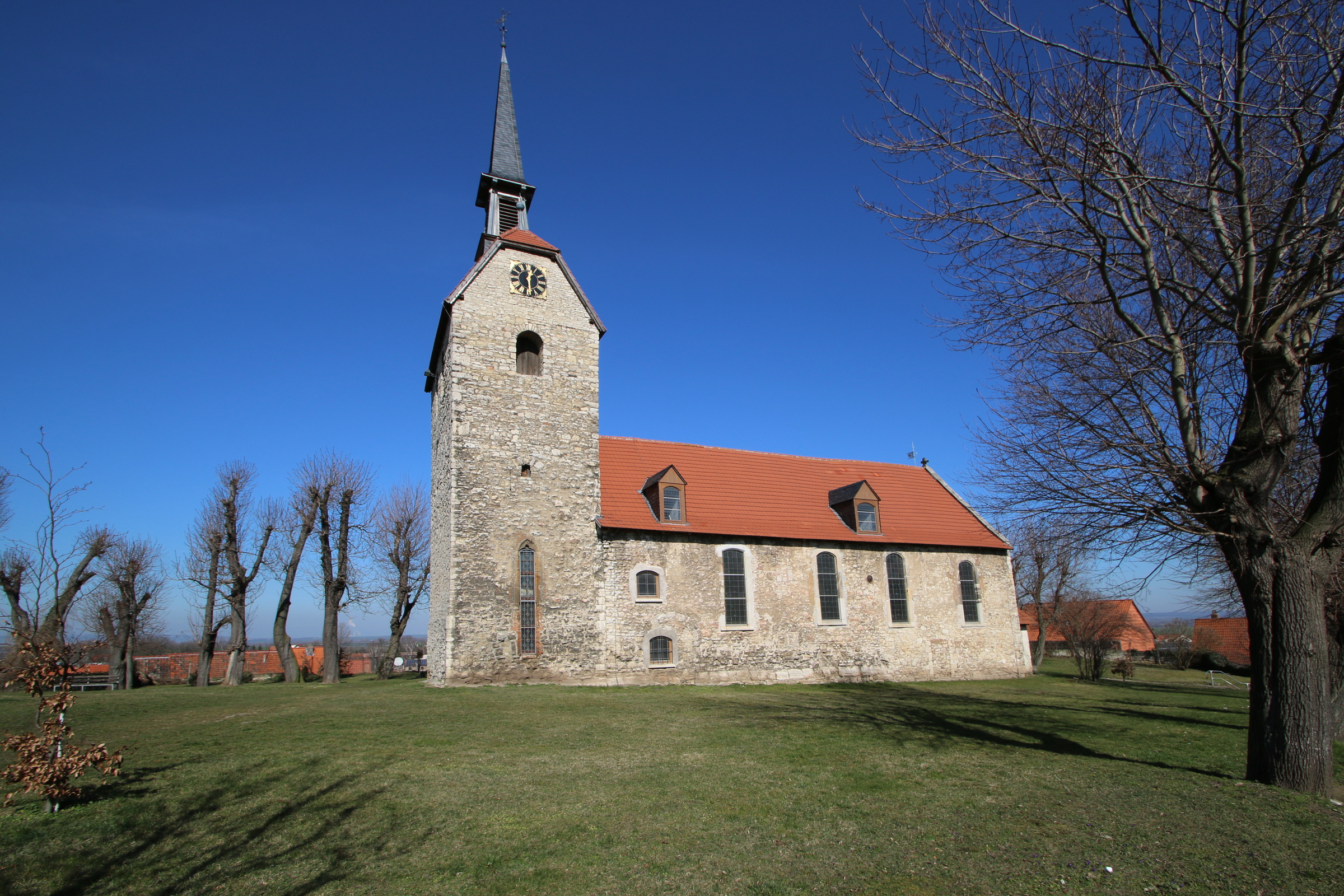 Dorfkirche in Schlanstedt / Huy